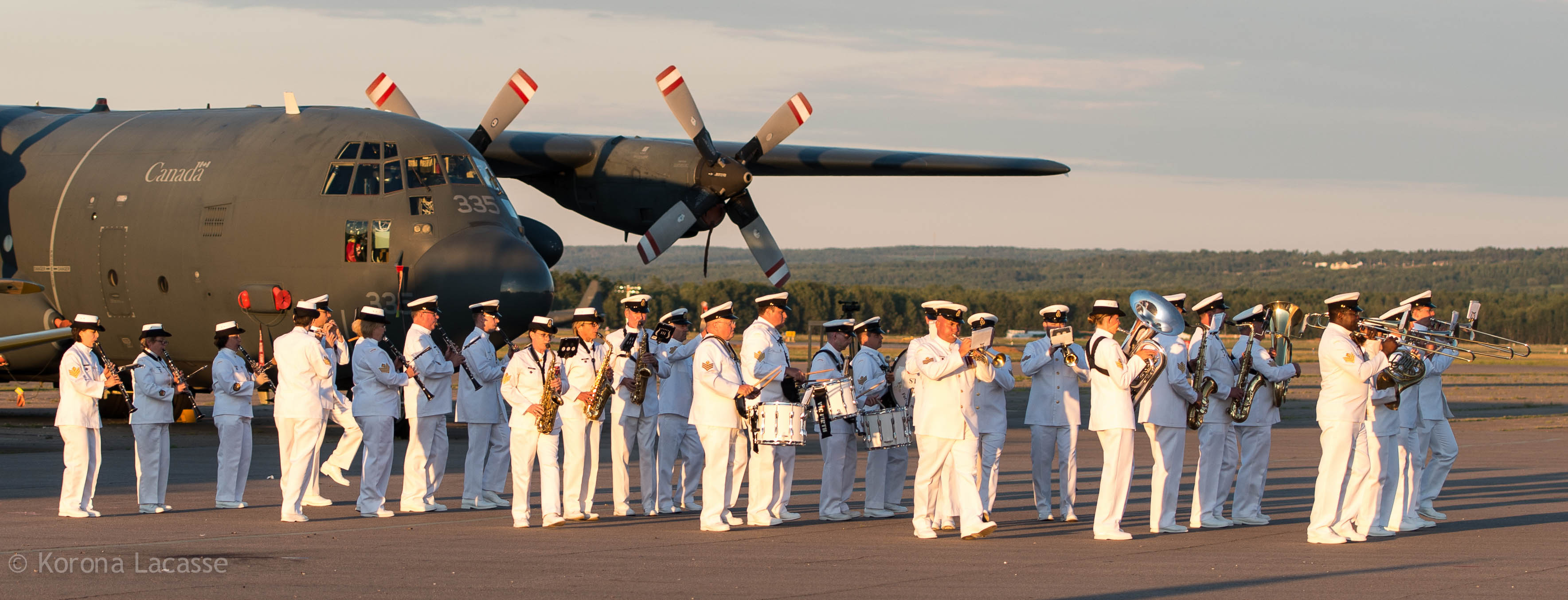 14 Wing Greenwood